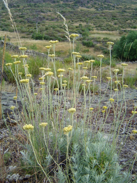 Helychrysum stoechas, Sierra de Ávila, España